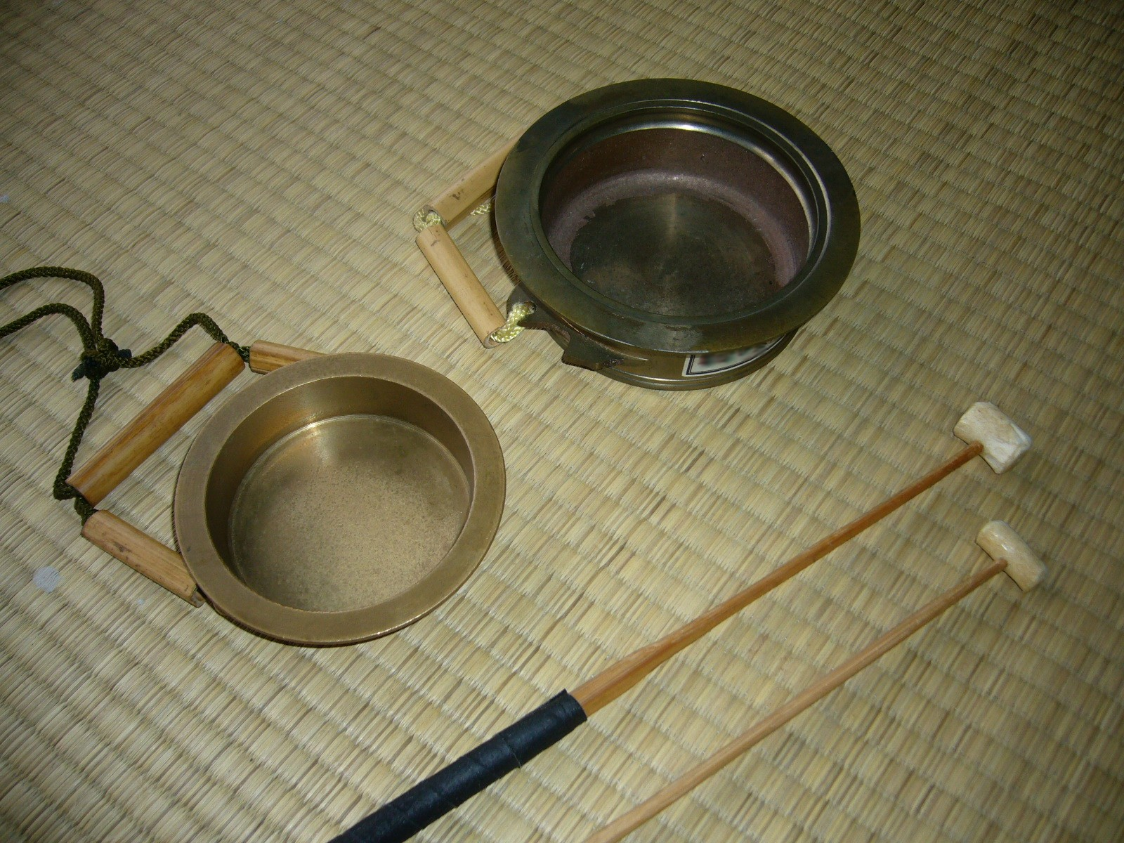 japanese-gong,kane,katori-city,japan.